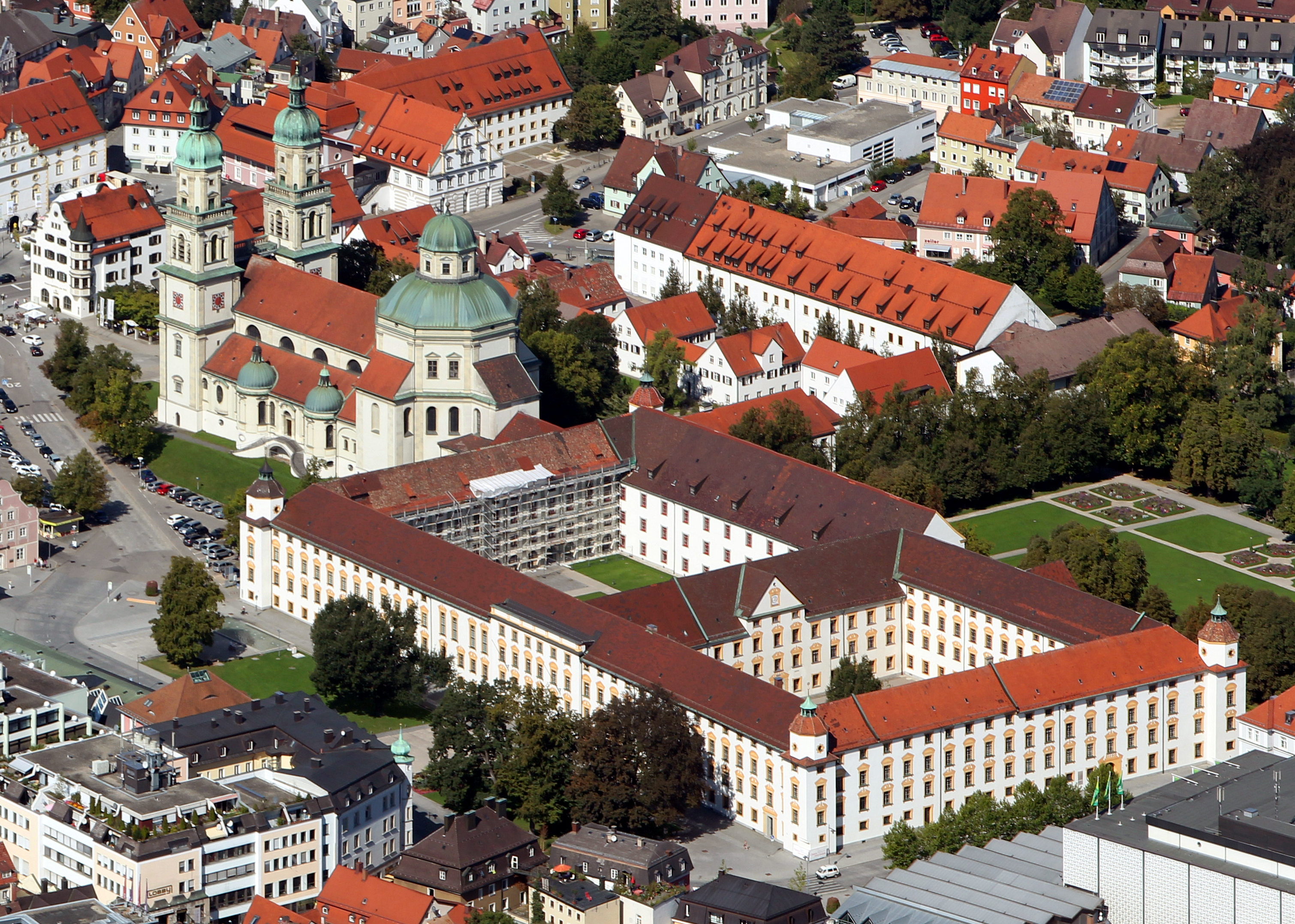 Fürstäbtliche Residenz und Basilika St. Lorenz in Kempten (Allgäu)